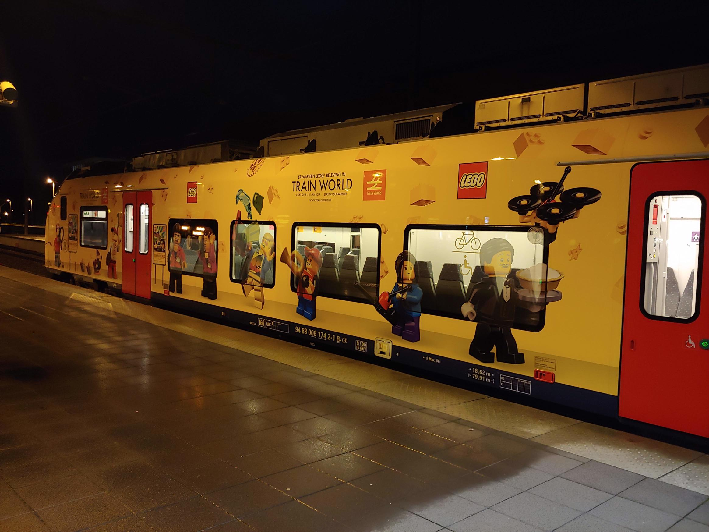 NMBS Desiro te Brugge met reclame voor de expositie over Lego in Train World (2018-2019)